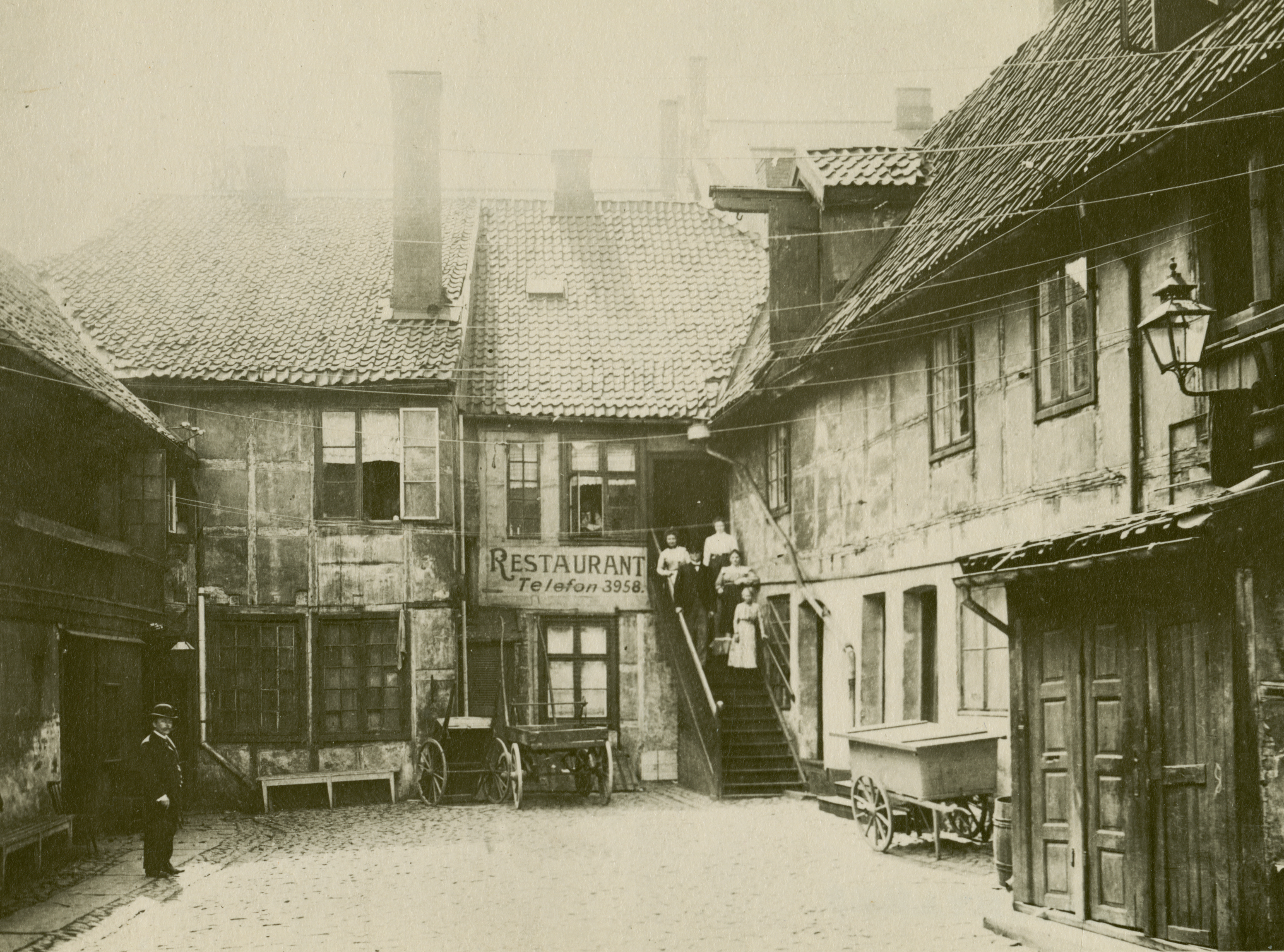 Stortorvets Gjestgiveri i Oslo, Oslo